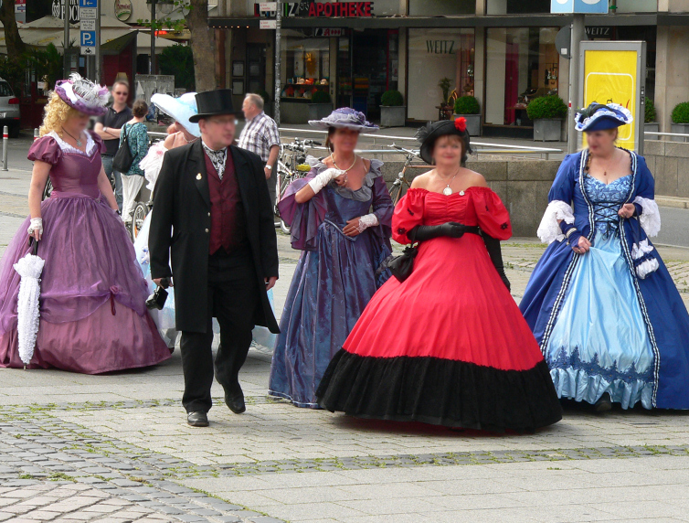 Schorsenbummel auf der Georgstraße